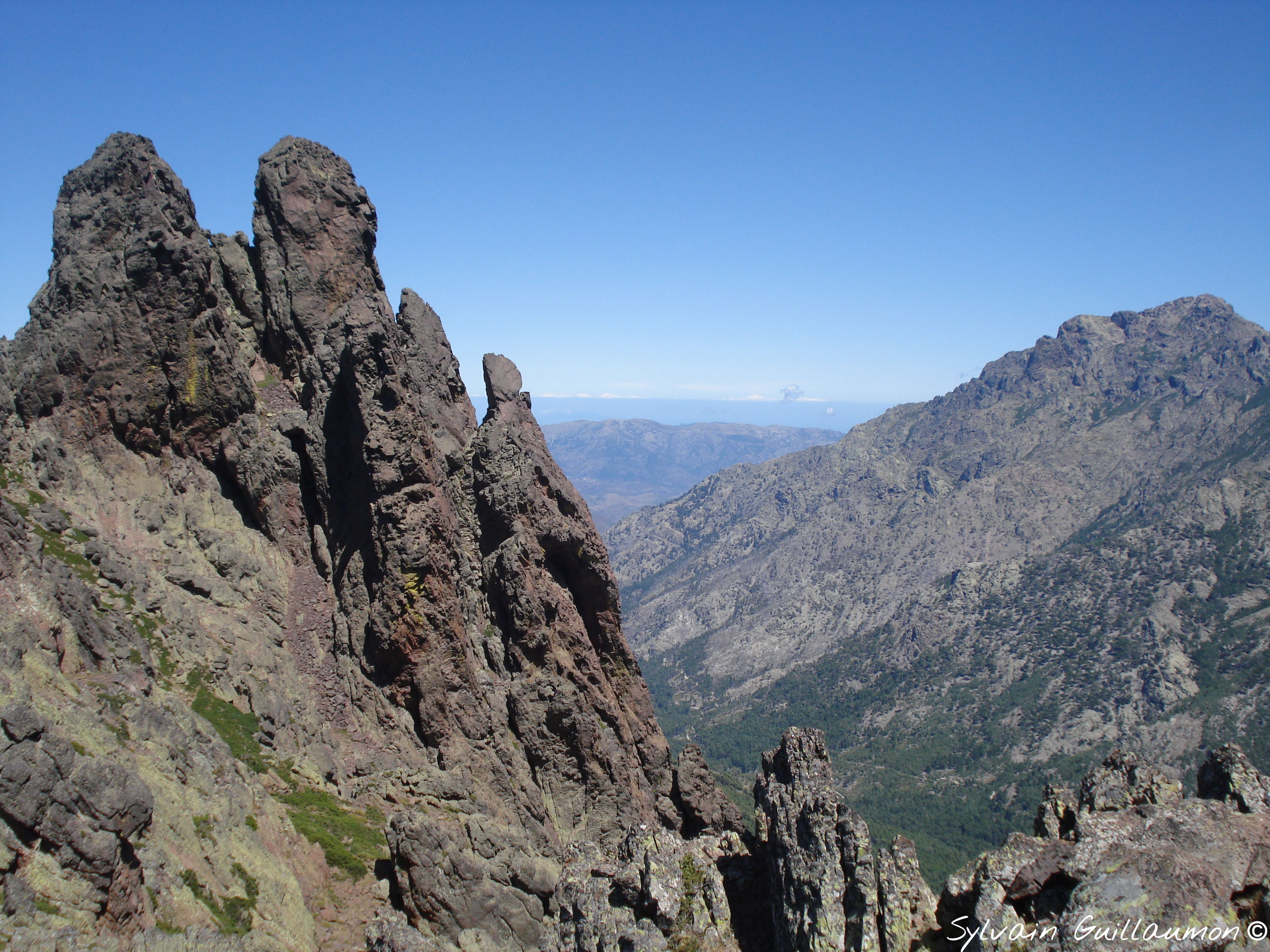 Vue sur Capu a u Dente (2029 m), la Vallée de la Tartagine et Monte Padru (2390 m), au loin le Massif du Tenda, depuis le point coté 1993 m sur IGN